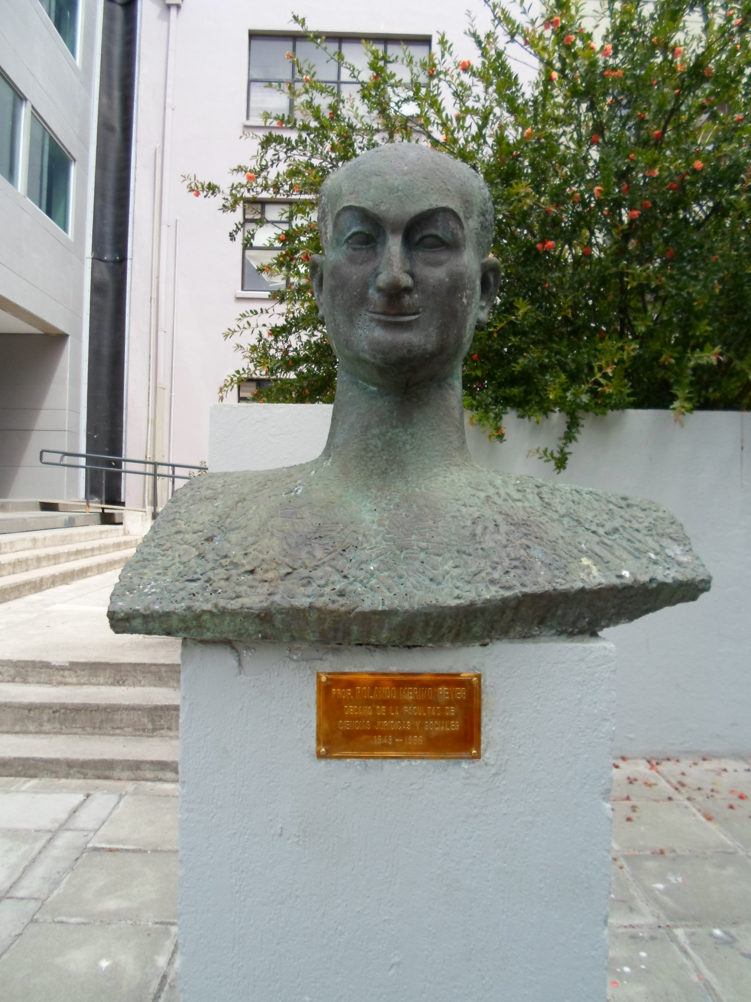 Profesor Rolando Merino Reyes, decano de la Facultad de Ciencias Jurídicas y Sociales (1943-1956), Universidad de Concepción. Busto realizado por el escultor Samuel Román.